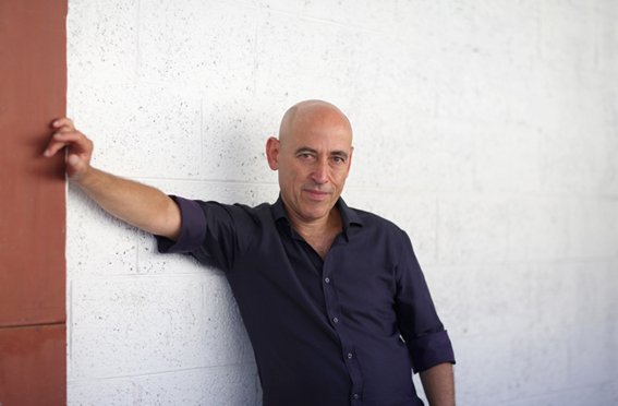 האמן נחום טבת